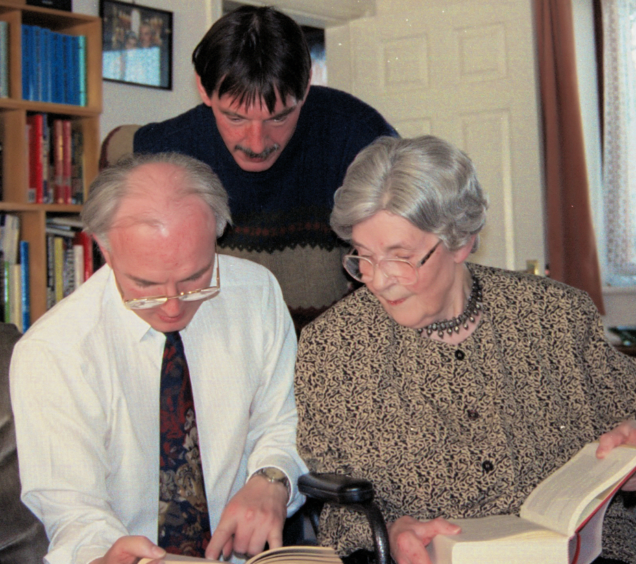 Ellis Peters met haar manager en haar Nederlandse vertaler Pieter Janssens